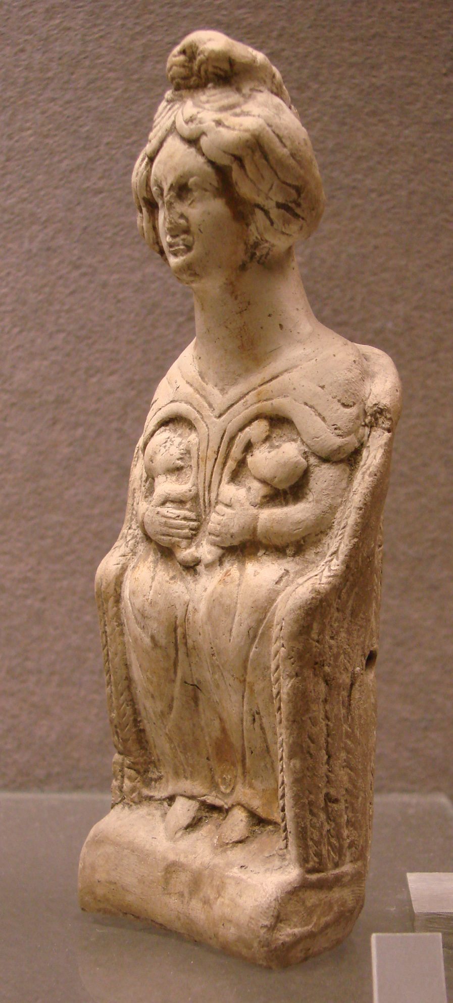 Déesse-mère allaitant deux enfants.Période gallo-romaine.Musée de Picardie à Amiens.